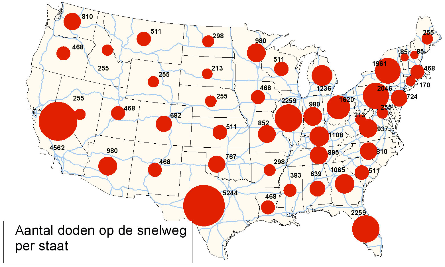 Eigen gemaakte afbeelding. De spreiding van het kenmerk (het aantal snelwegdoden in de VS per staat) is gefaked, maar berust op het werkelijk aantal doden (42.636) in 2004, voor de hele VS. Er is uitgegaan, om een voorbeeld te hebben, dat dit aantal doden over de staten evenredig is met het aandeel van de snelweglengte in die staat maal (de bevolking in die staat)^(0,5), en dat het aantal doden per staat gelijk verdeeld is over alle snelwegen in die ene staat, rekening houdend met de lengte van de individuele snelwegen. Deze aannames zijn behalve aanvechtbaar ook discutabel. Snelwegen bij steden zullen meer doden kennen. De orde van grootte is echter reëel, daarmee kan deze kaart als voorbeeld dienen voor cartografische doeleinden, maar niet voor overige (VS-) illustraties / doeleinden. Bron aantal inwoners obv tabellen uit: en aantal doden uit